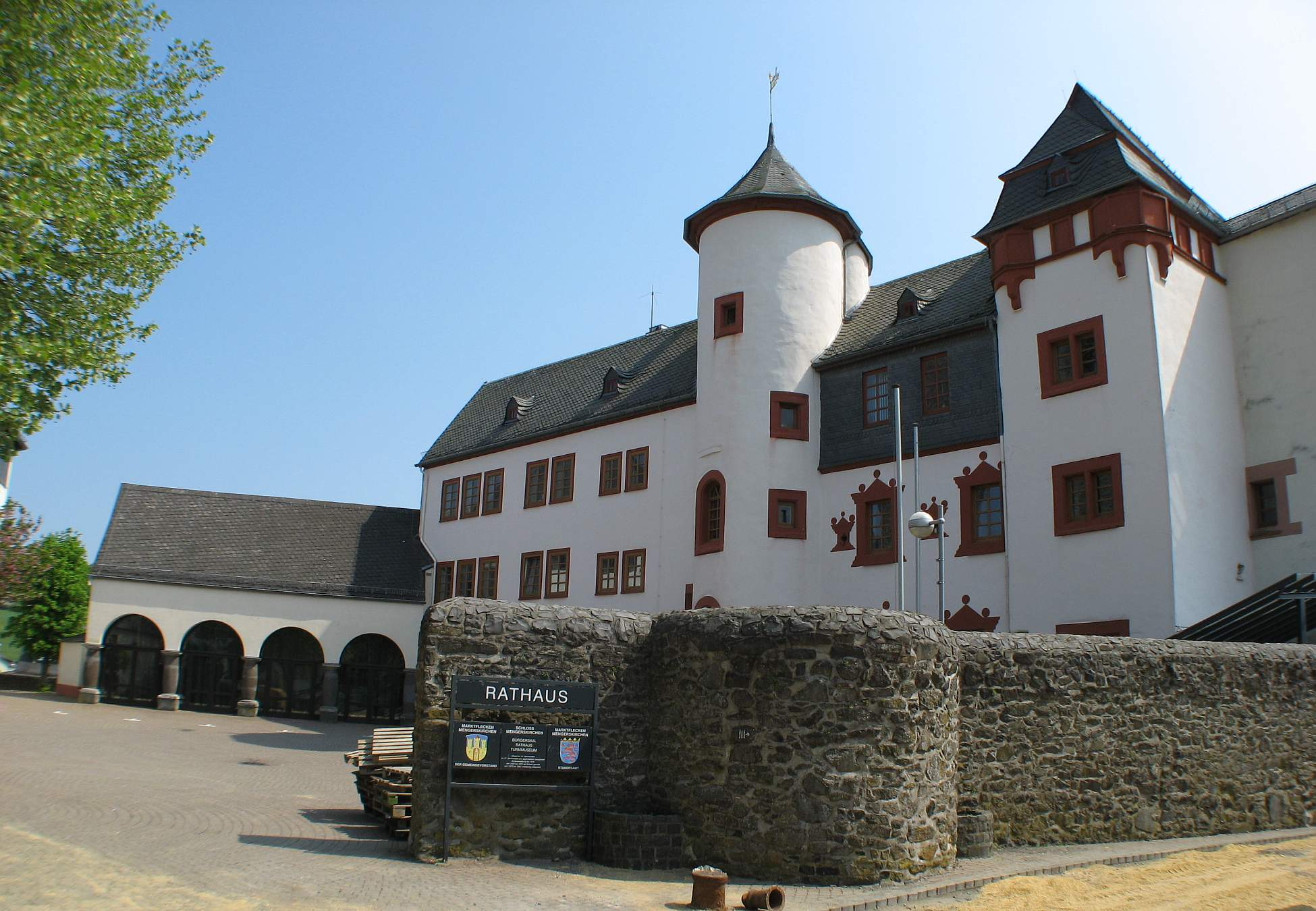 Schloss in Mengerskirchen erbaut ab 1341, heute Rathaus